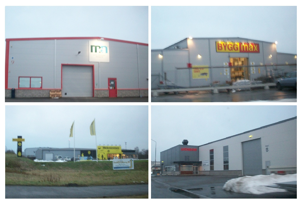 Aspelund i Skövde